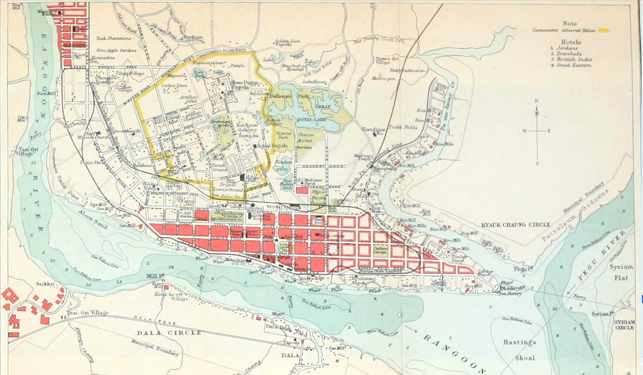 Map of Rangoon